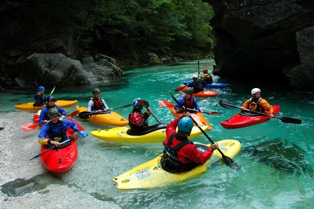 Kajak rekreacija